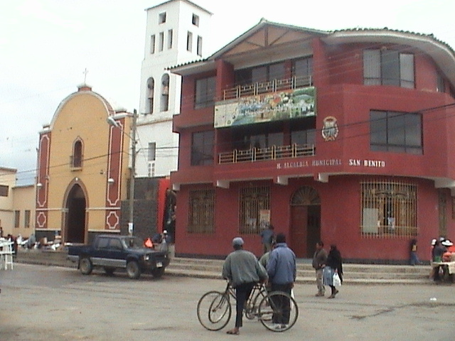 El Templo y la Plaza Principal de San Benito